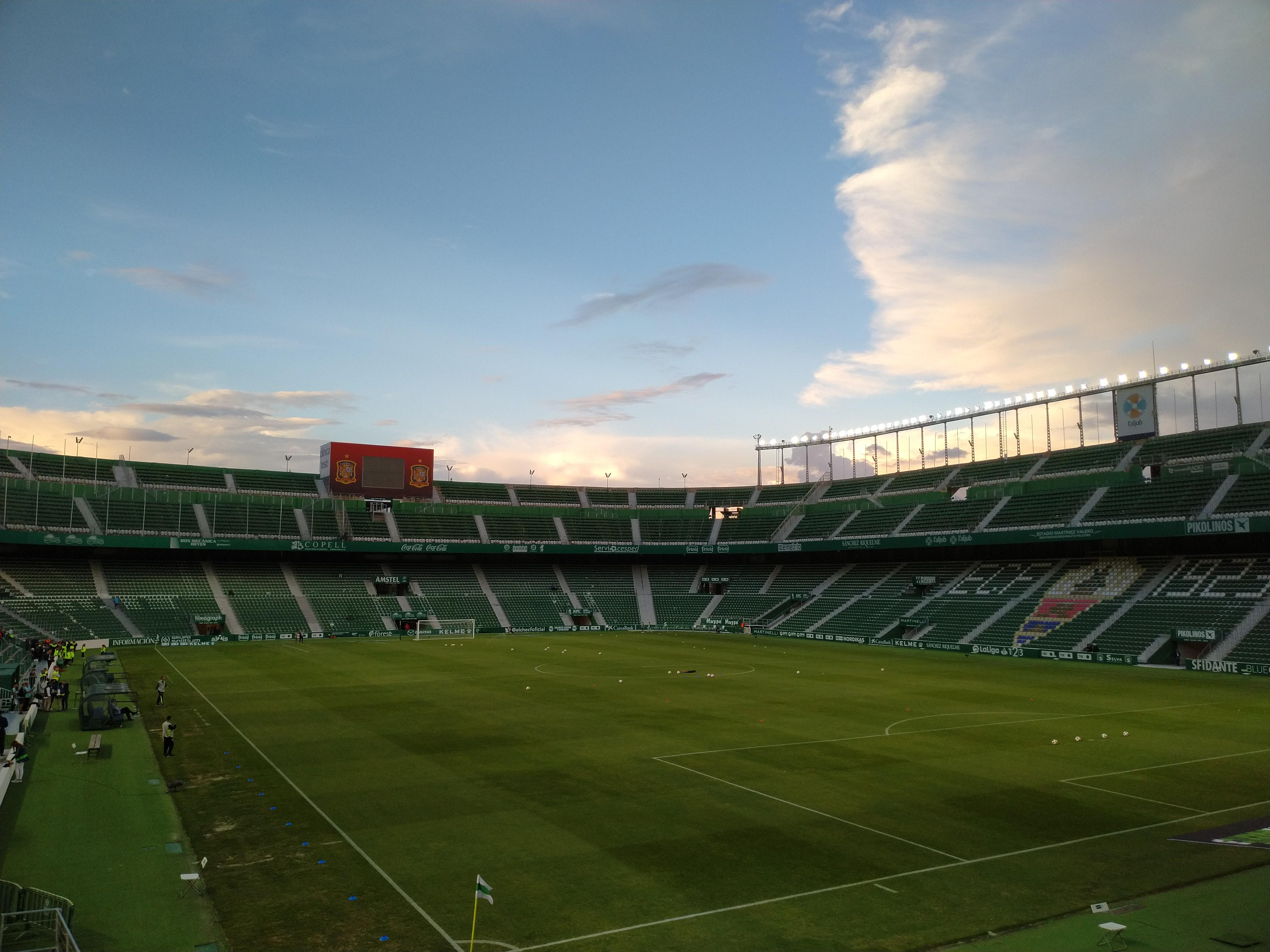 Imagen Estadio Martínez Valero (2018)